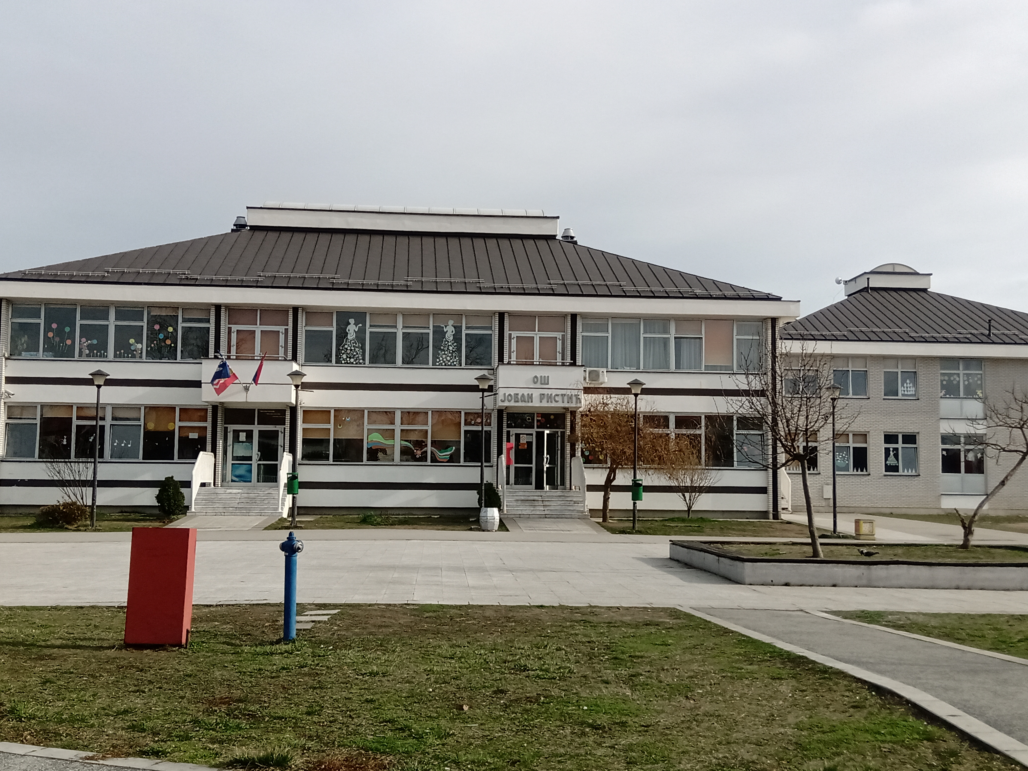 Основна школа Јован Ристић у Борчи